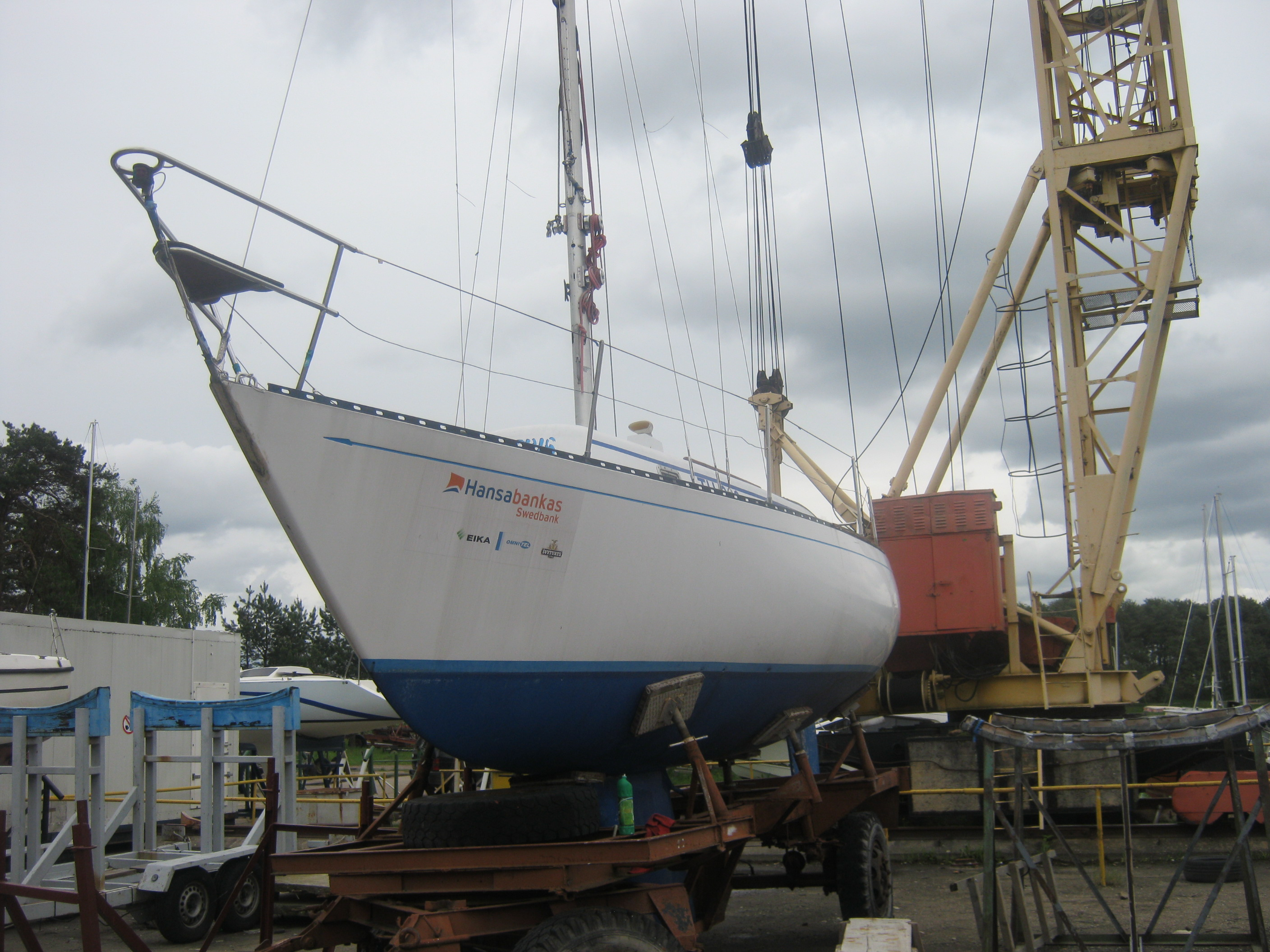 Kauno jachtklubas